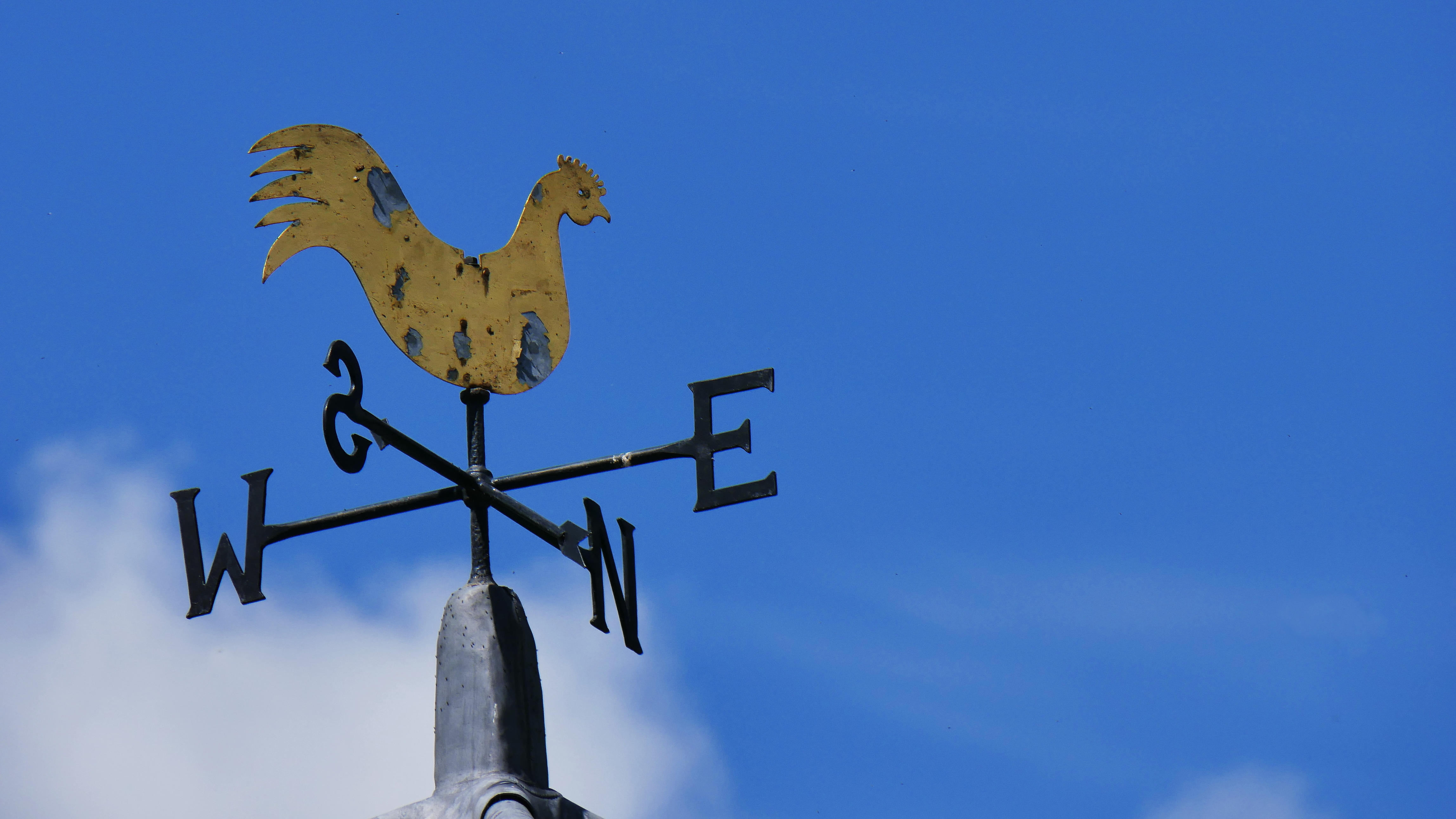 St Gregory's Minster, Kirkdale